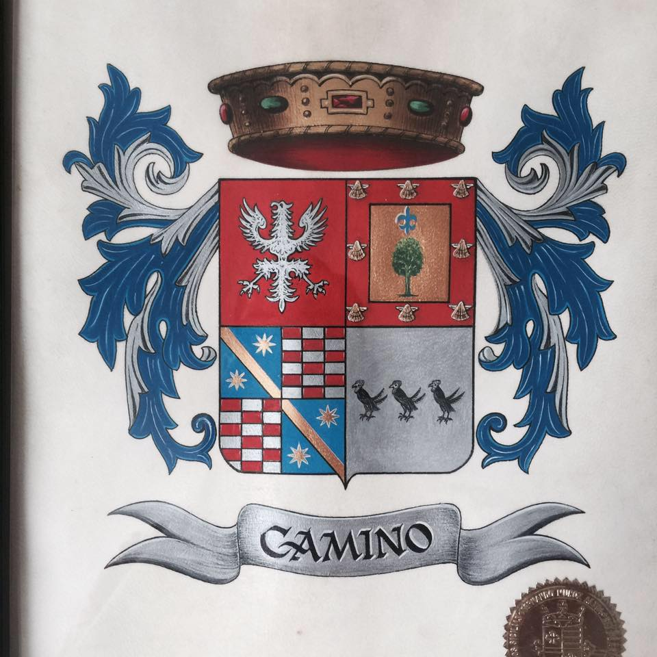 Coat of Arms